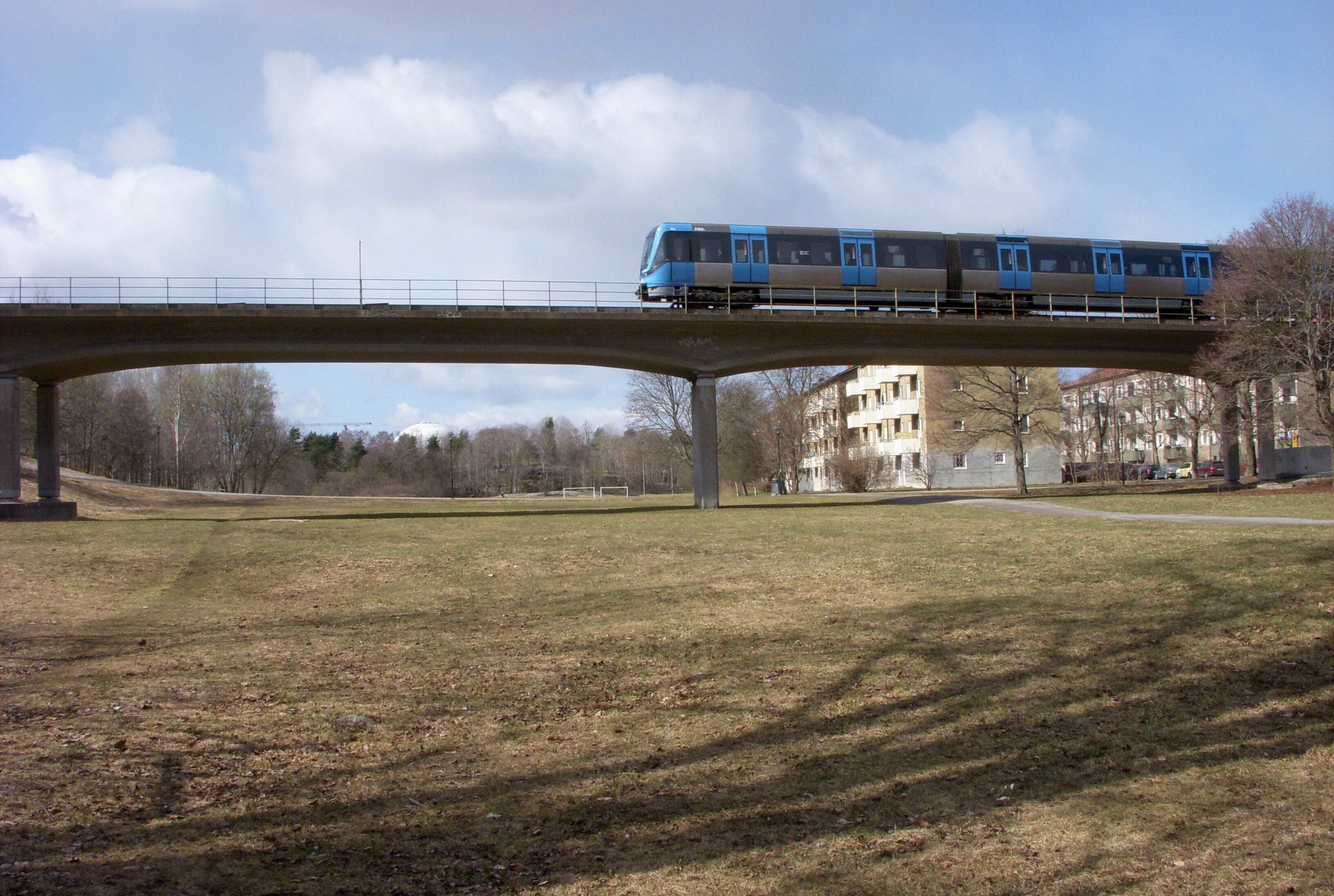 Nytorps gärde mot väst 2012